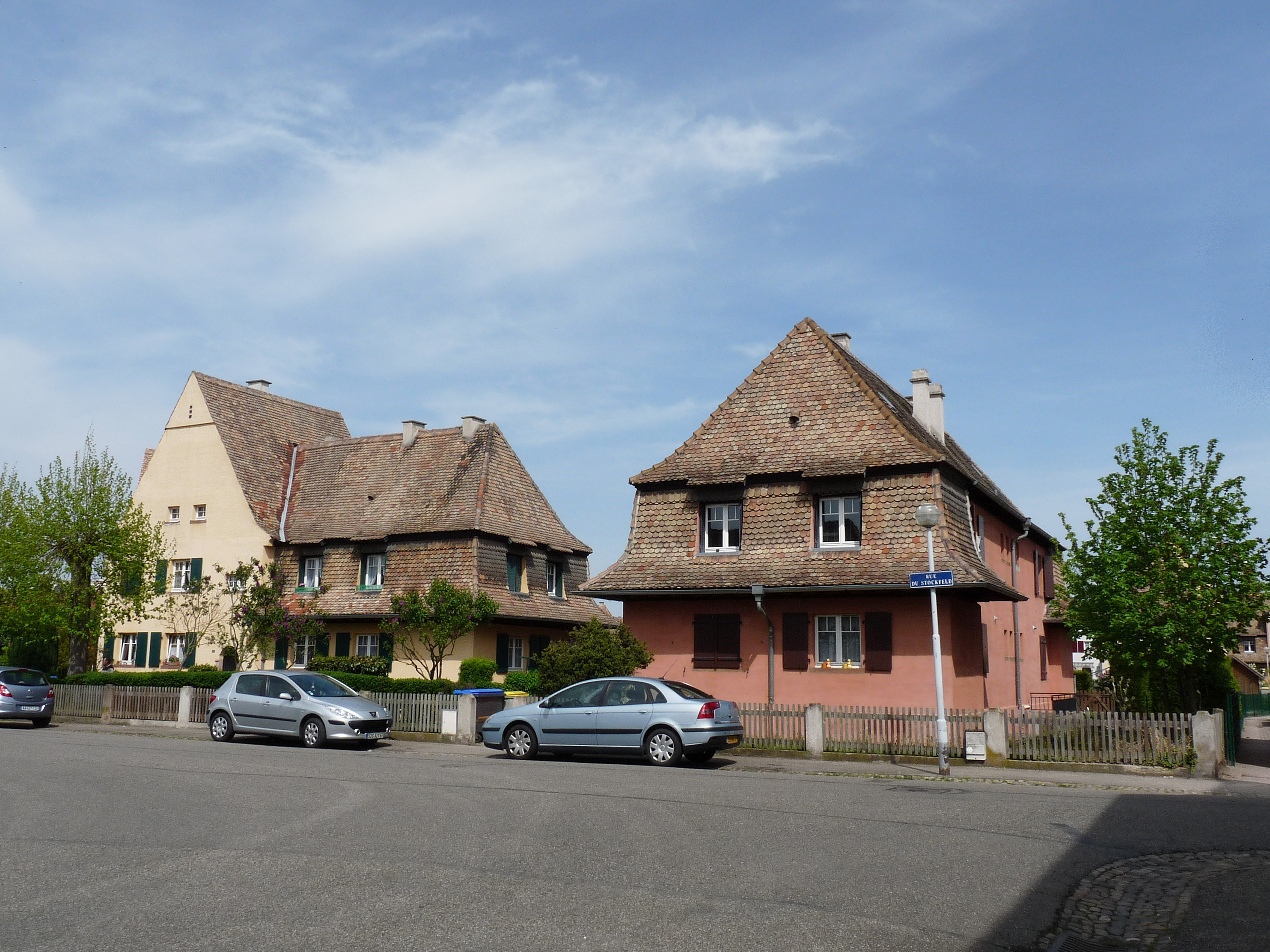 Strasbourg-Neuhof : cité-jardin du Stockfeld ; construction 1910-1912 ; architecte : Edouard Schimpf (mort en 1916) ; inscrit aux MH en 1996 ; rénovation en 2005